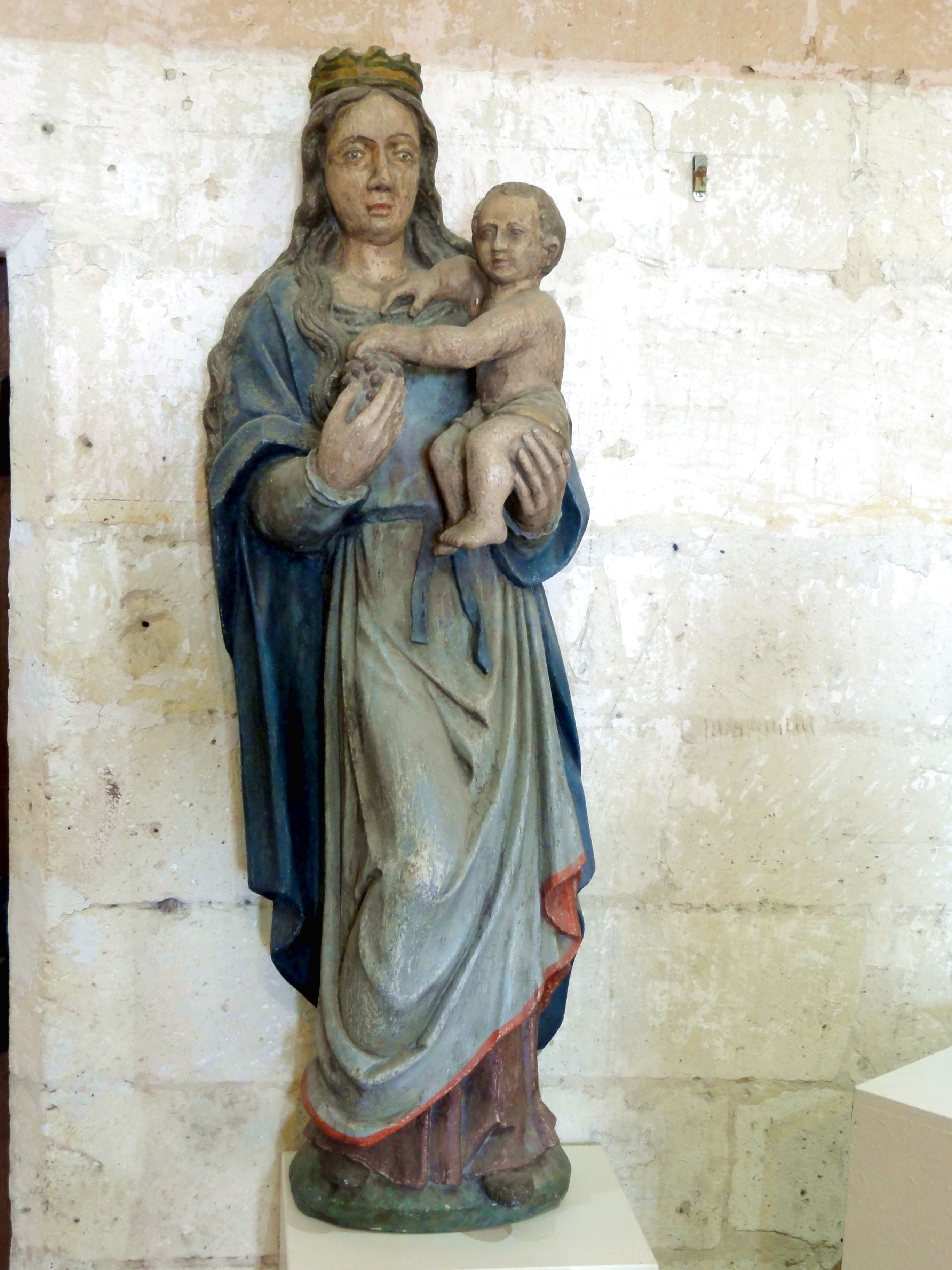 Vierge à l'Enfant, époque moderne.